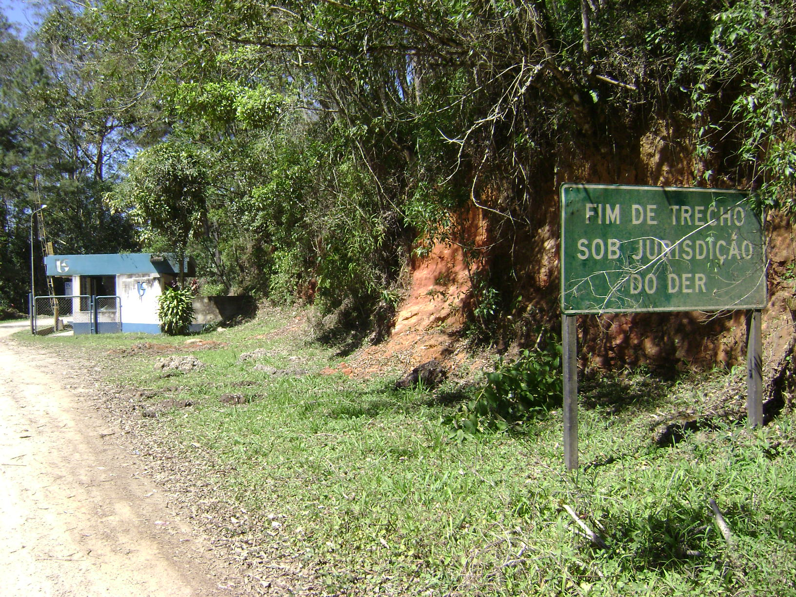 Fim da rodovia SP-92 no Sistema Produto Rio Claro da Sabesp, em Biritiba Mirim.